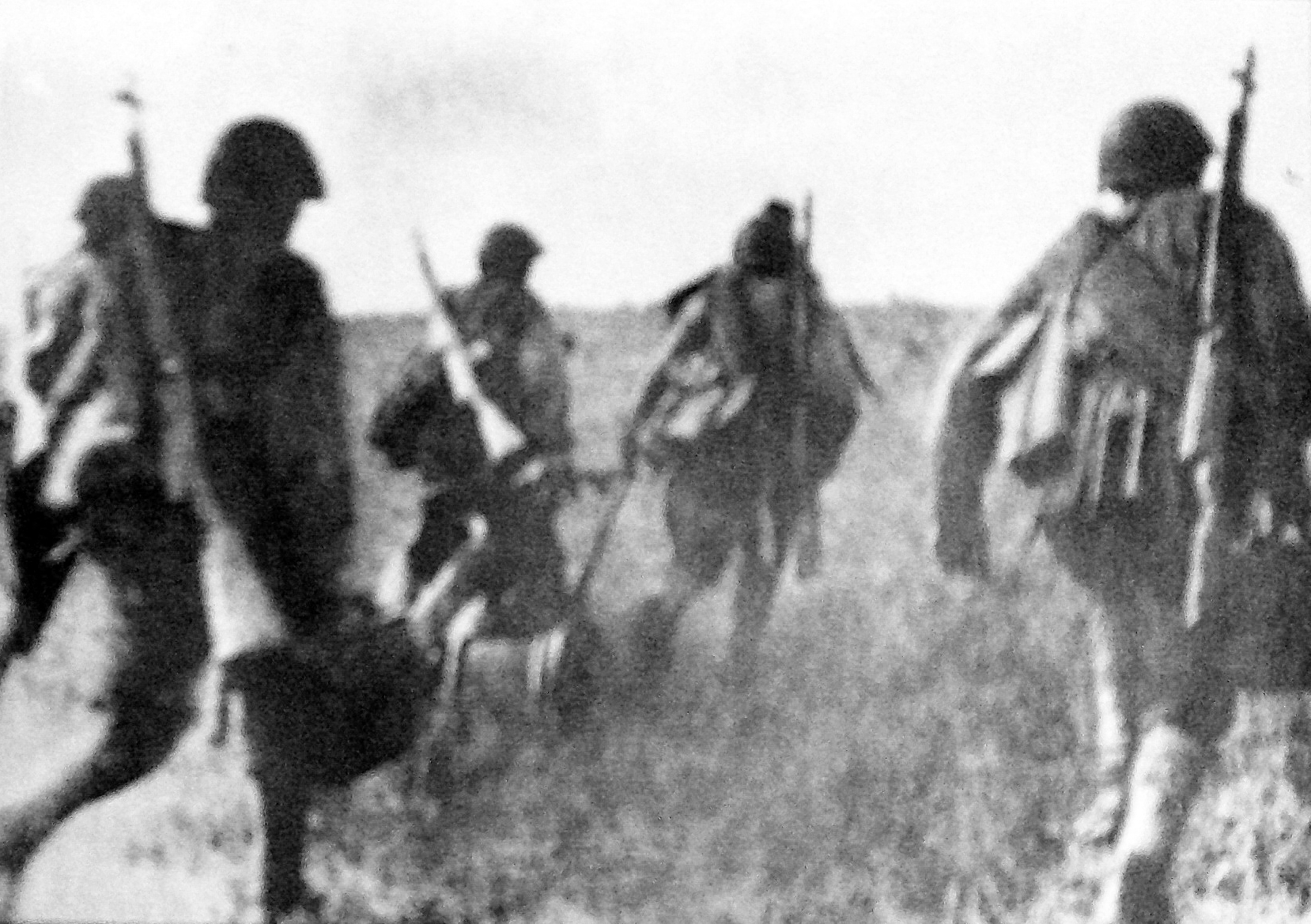 Bitwa pod Lenino, Ludowe Wojsko Polskie